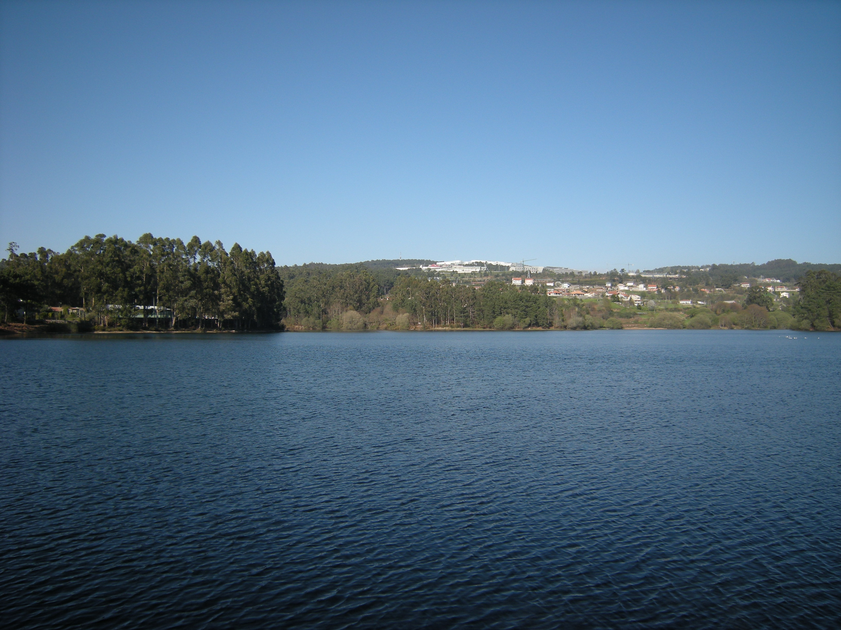 Embalse de Zamáns